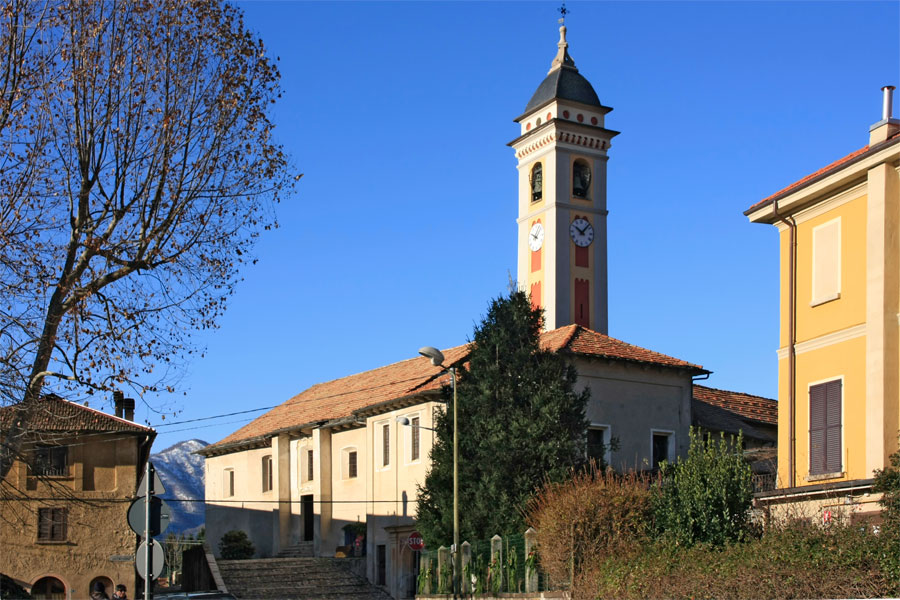 Chiesa Parrocchiale di San Maiolo Abate di Agrano di Omegna